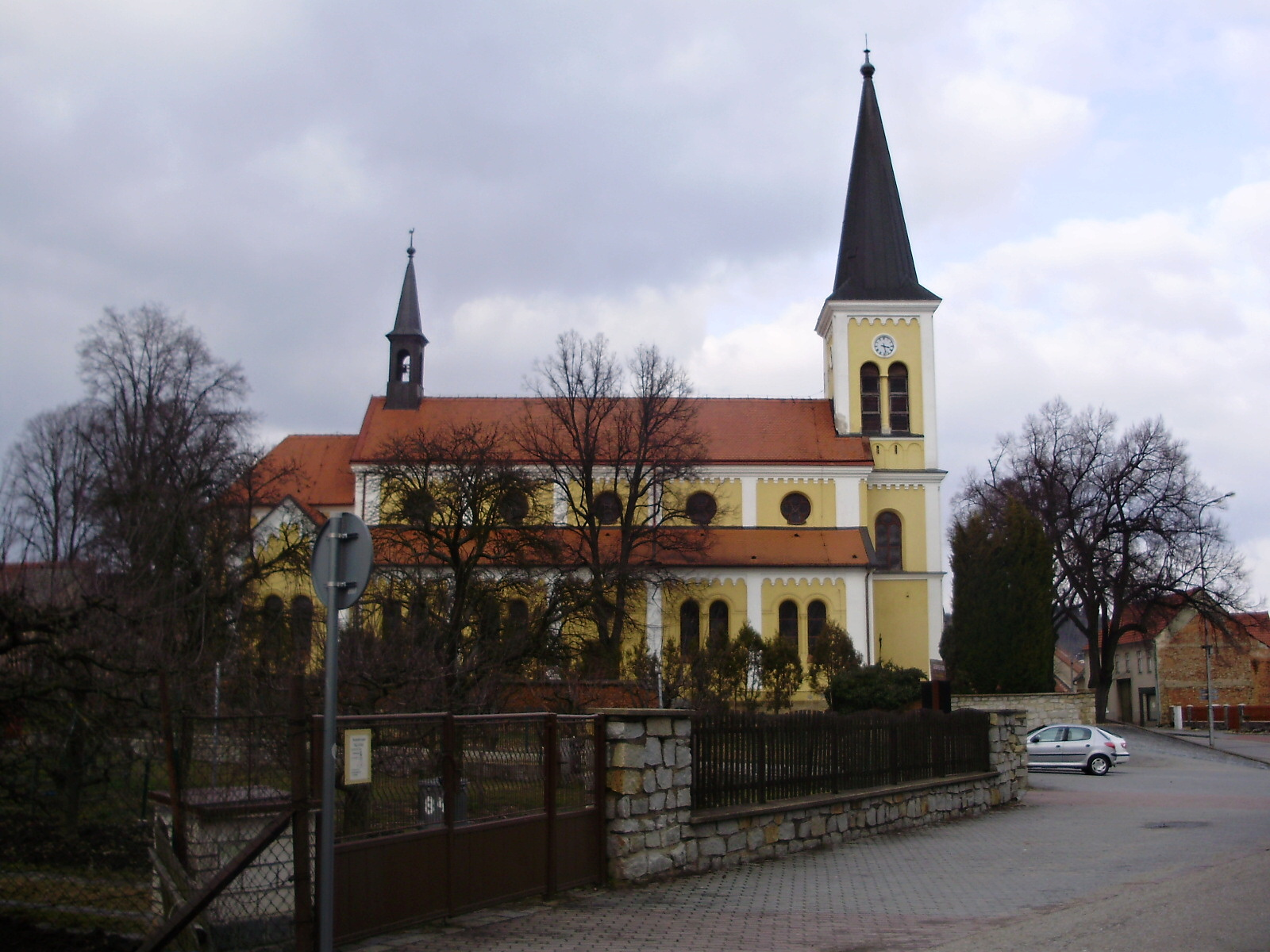 Zbýšov kostel sv. Matina